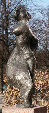 Sophie by Asa Hellstrom at Katarina Bangata, Stockholm, Sweden.